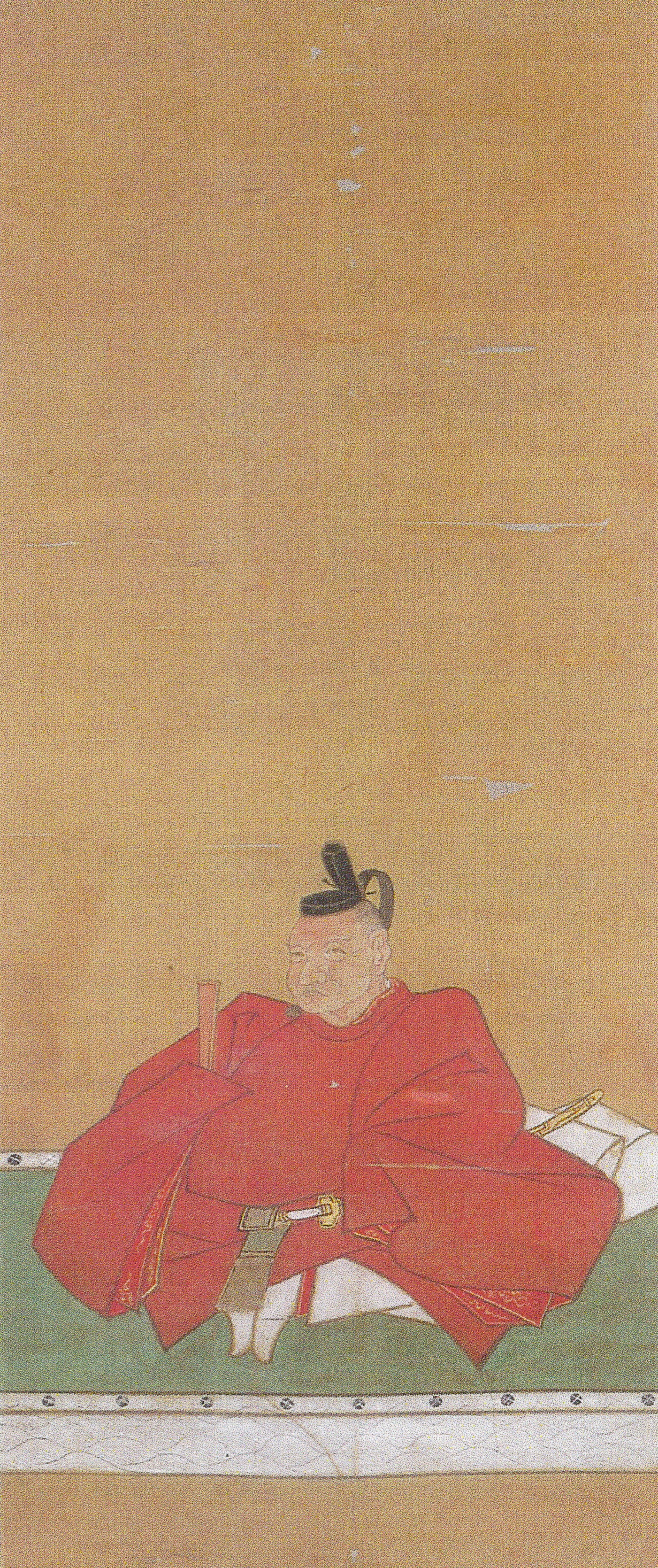 紀伊新宮藩2代藩主・水野重良の肖像画。